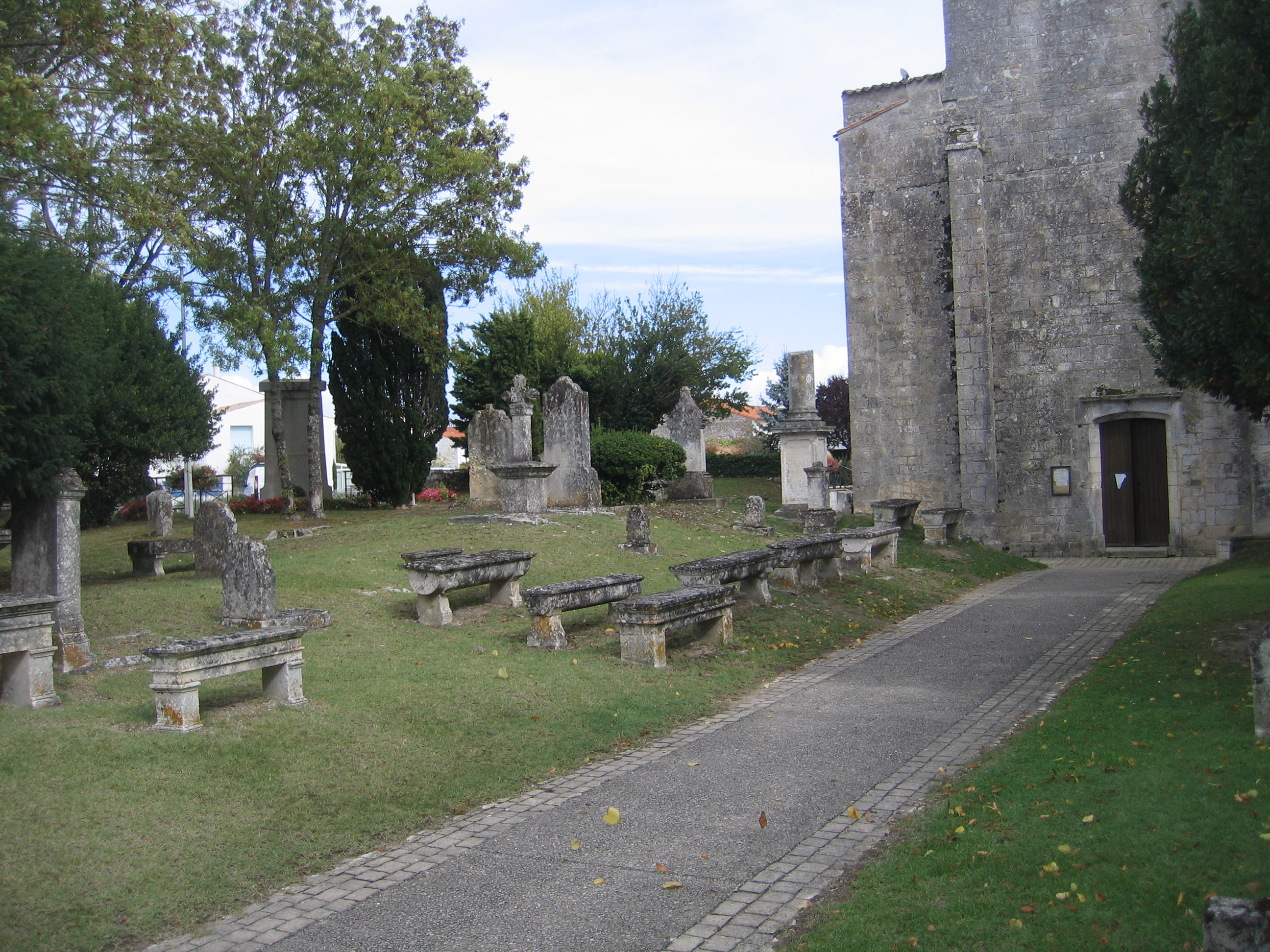 Cimetière de Vaux-sur-mer (17640) Vue générale